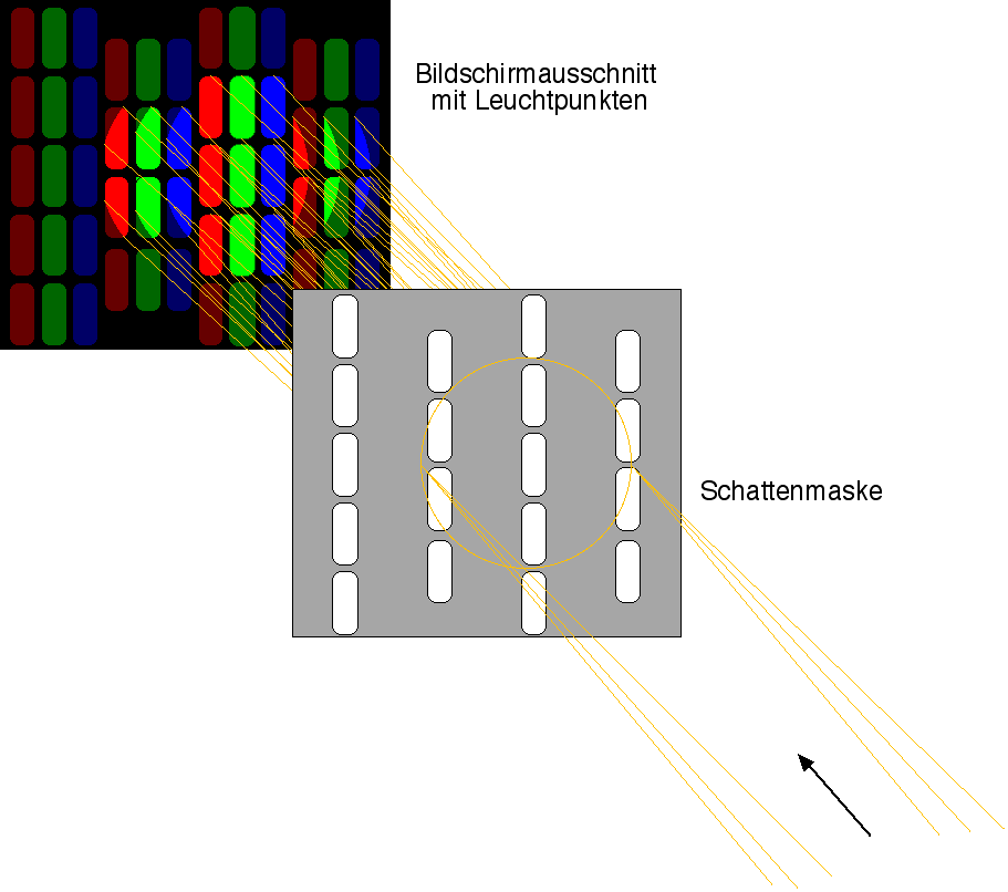 Der Weg der drei Elektronenstrahlen durch einen Ausschnitt einer Schlitz - Schattenmaske einer Farbbildröhre.